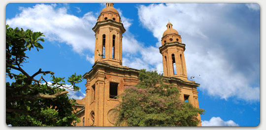 nada nos